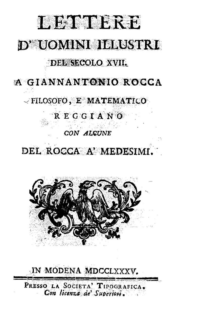 Lettere d'uomini illustri del secolo XVII a Giannantonio Rocca matematico reggiano con alcune del Rocca a' medesimi. - In Modena : presso la Società tipografica, 1785. - 467, [1] p., [1] c. di tav. ripiegata : ill. ; 2° .